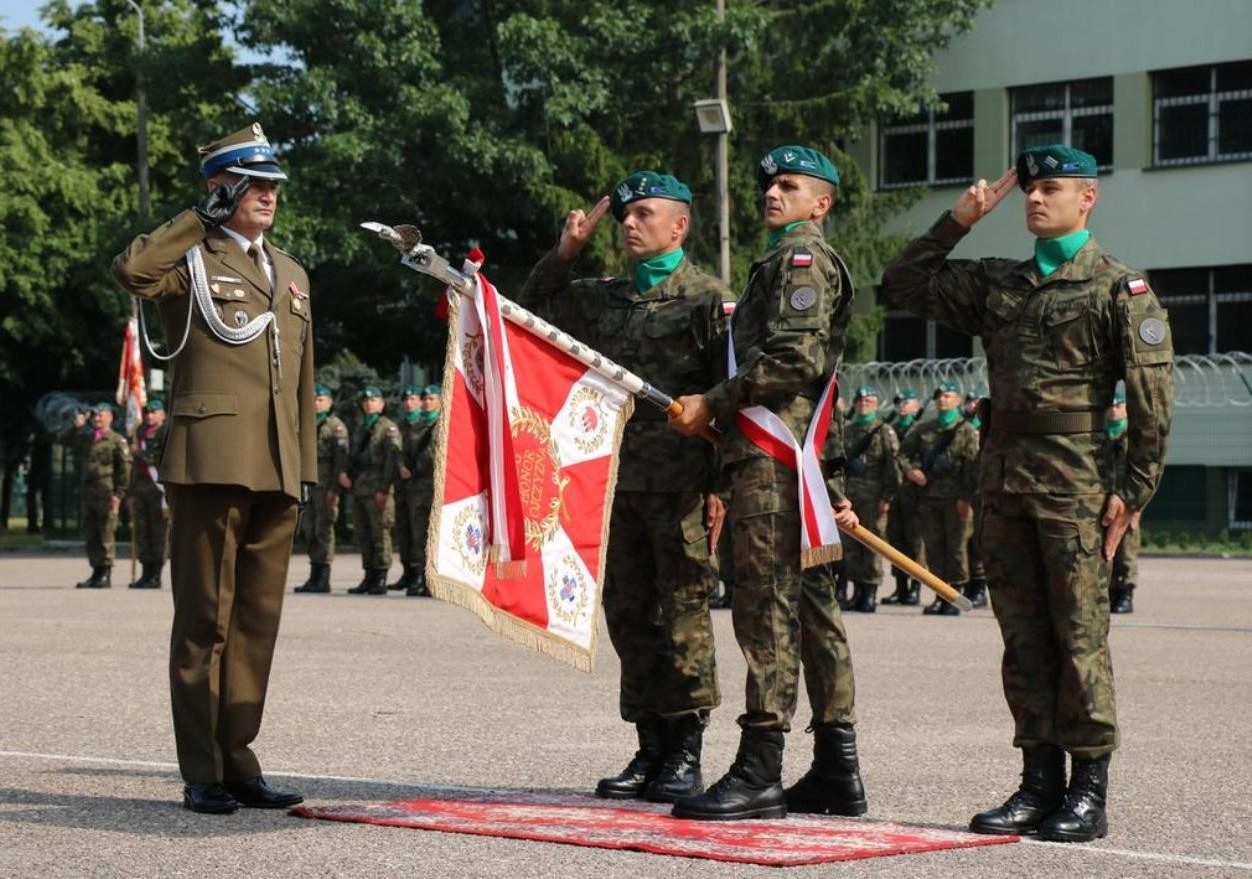 Przasnysz, 01.07.2019. Nowy dowódca 2Orel